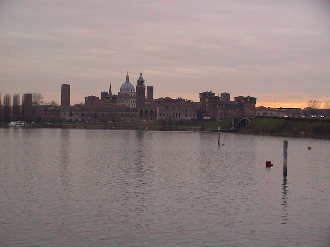 Mantova la città dal lago di mezzo, own work, 31/12/2004,Pietro Liberati